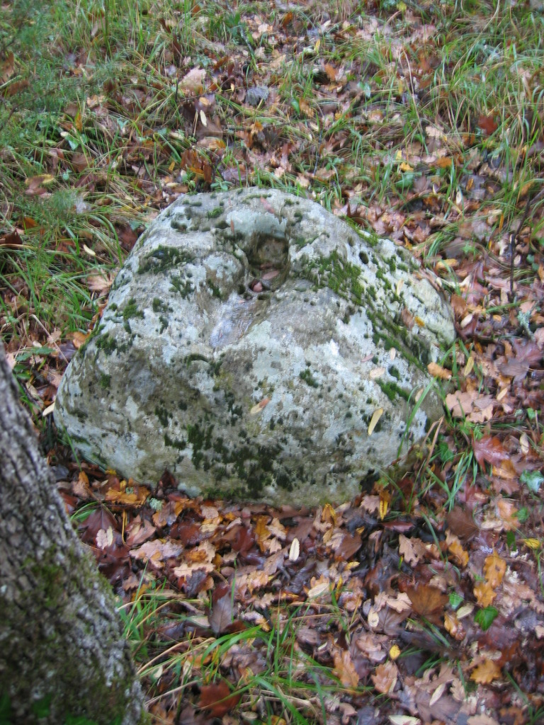 Pierre de sacrifice dite "pierre du diable" age du bronze ancien (2000 avjc) Site : Soumensac (Lot et Garonne) Date de prise de vue novembre 2006 Auteur : Jacques David